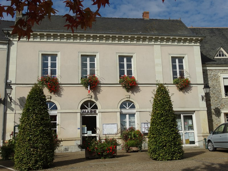 Mairie d'Auvers le Hamon